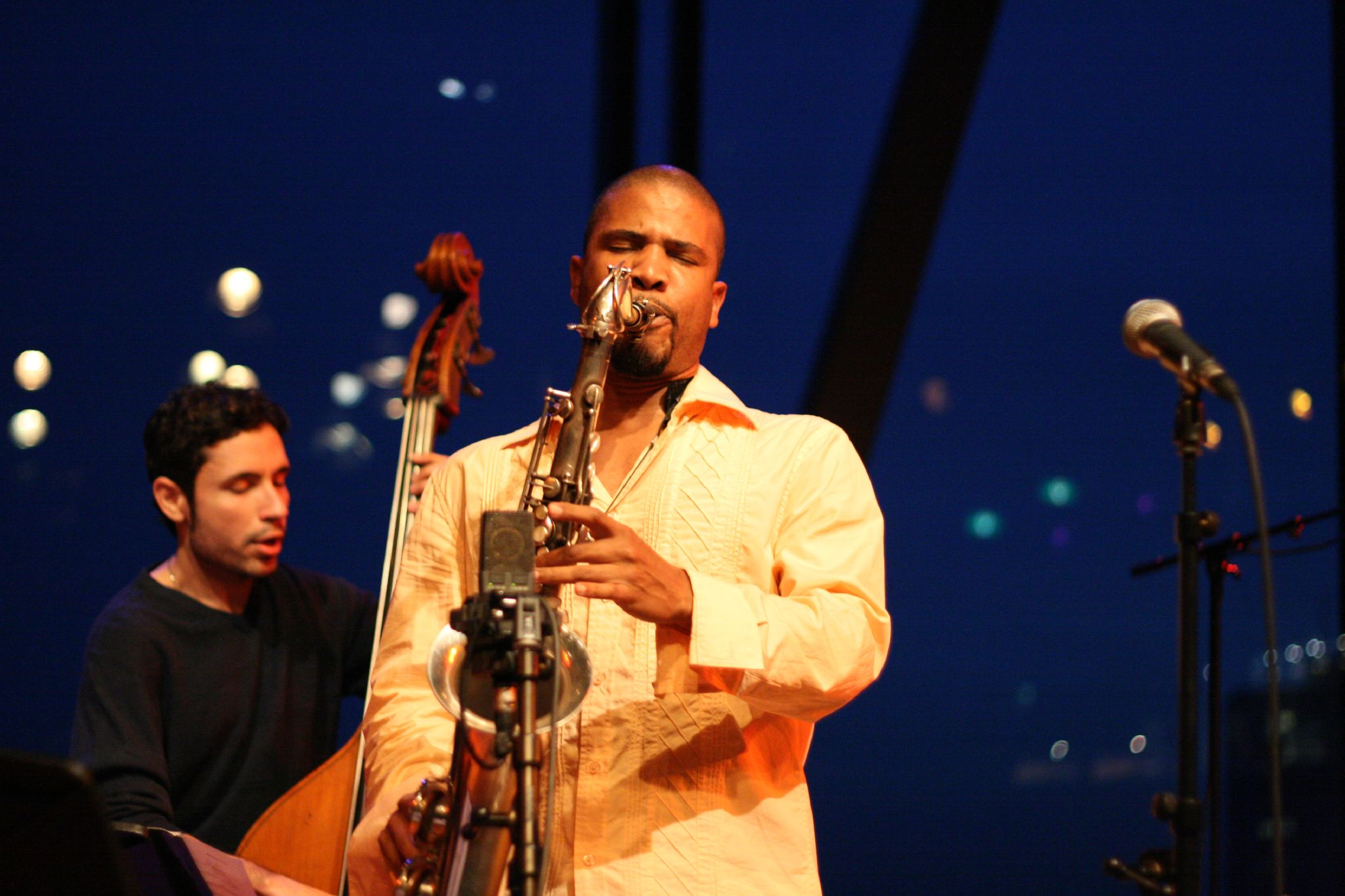 David Sánchez Group, 29 April 2007, Bimhuis Amsterdam